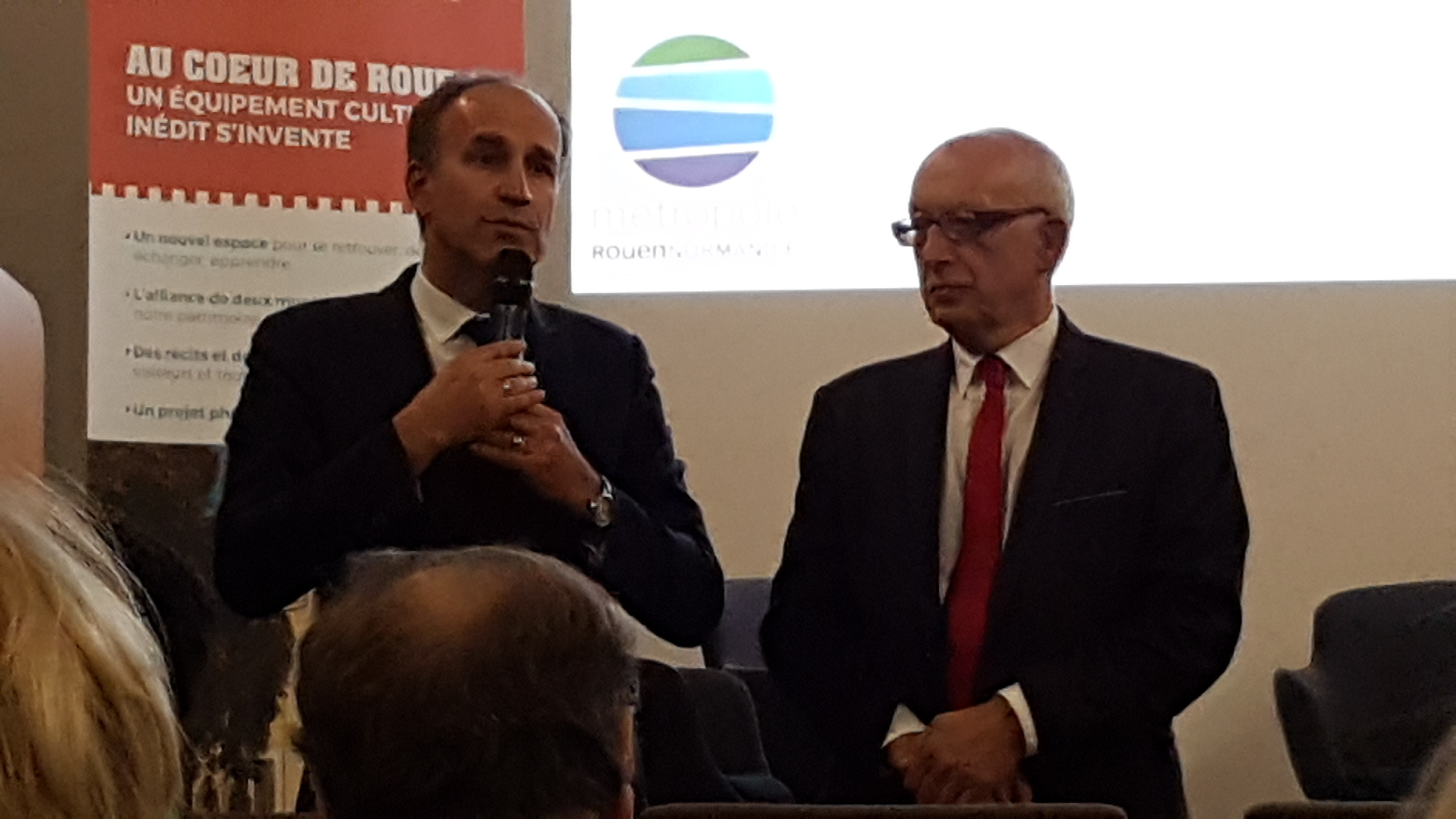 Frédéric Sanchez, président de la Métropole Rouen Normandie et Yvon Robert, maire de Rouen et vice-président de la Métropole, lors de la présentation du projet Beauvoisine dans la salle Lavallée de l'Hôtel des Sociétés Savantes à Rouen.